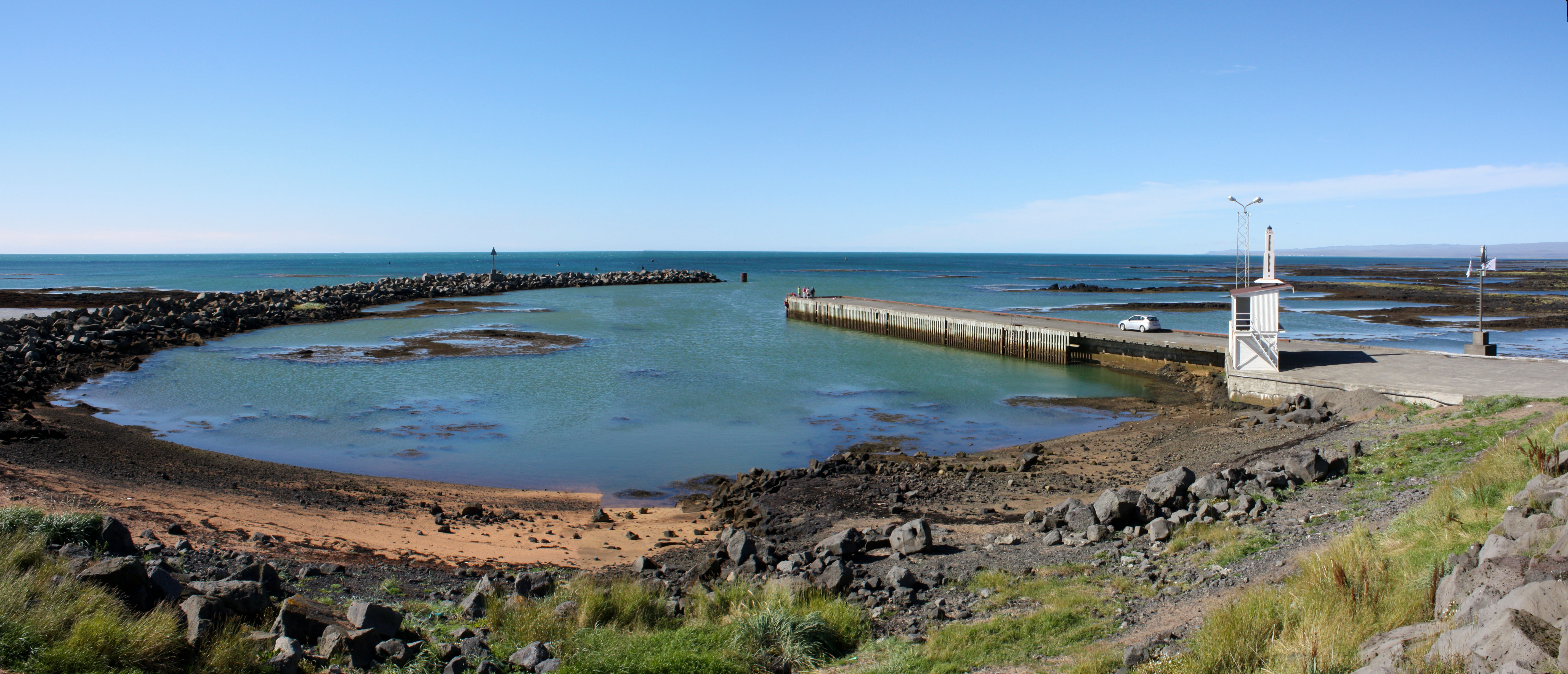 Stokkseyri Panorama